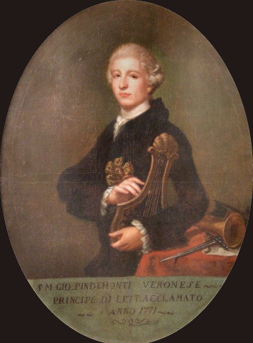 Giovanni Pindemonte (1751-1812), tragediografo e poeta italiano